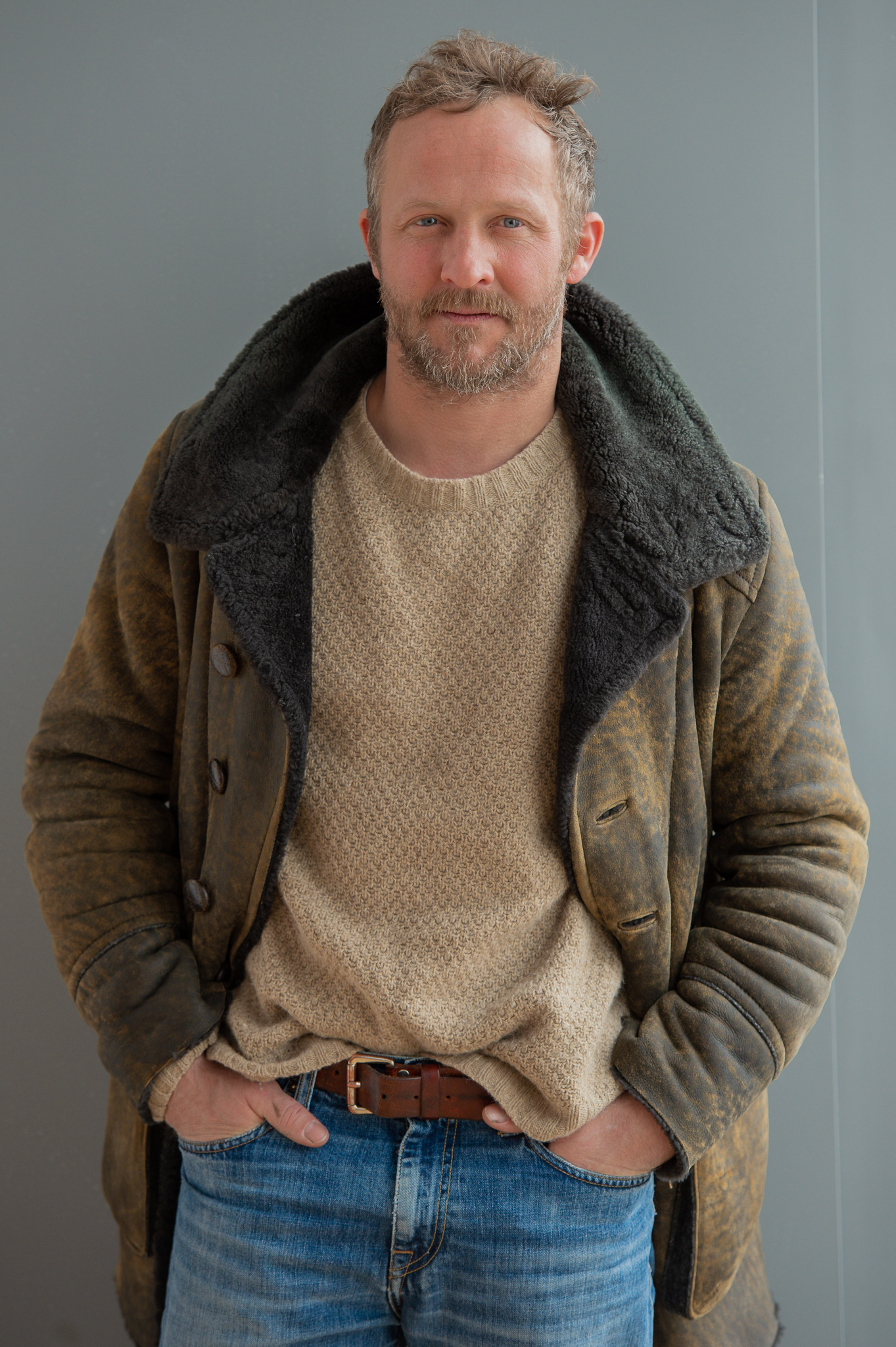 BR,Bayerischer Rundfunk,Bayerisches Fernsehen,Filmbrunch 2019,Literaturhaus München,Maximilian Brückner